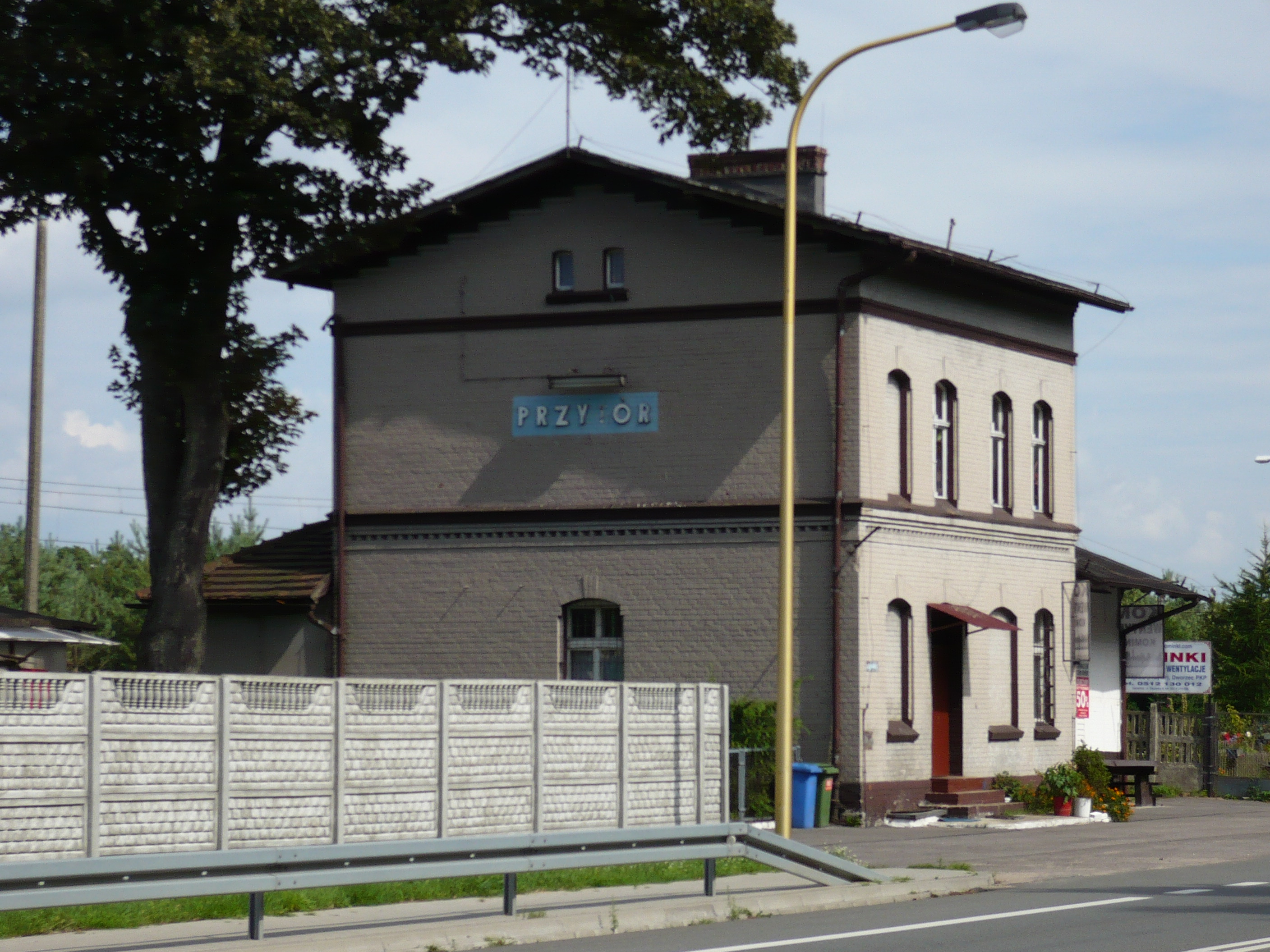 Budynek przystanku osobowego Świnoujście Przytór